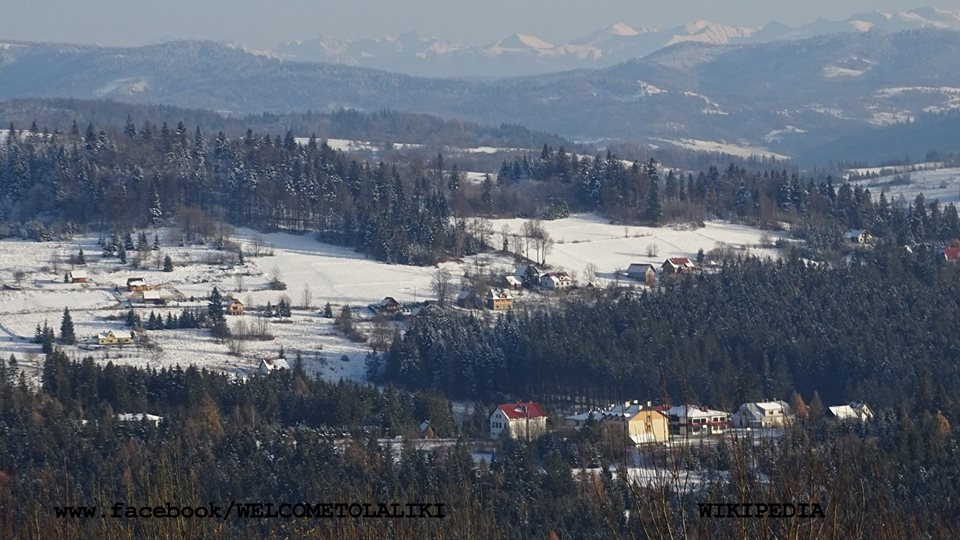 Pożarna, ZAZ Laliki, Kasperki, Szklankówka na tle Beskidów i Tatr